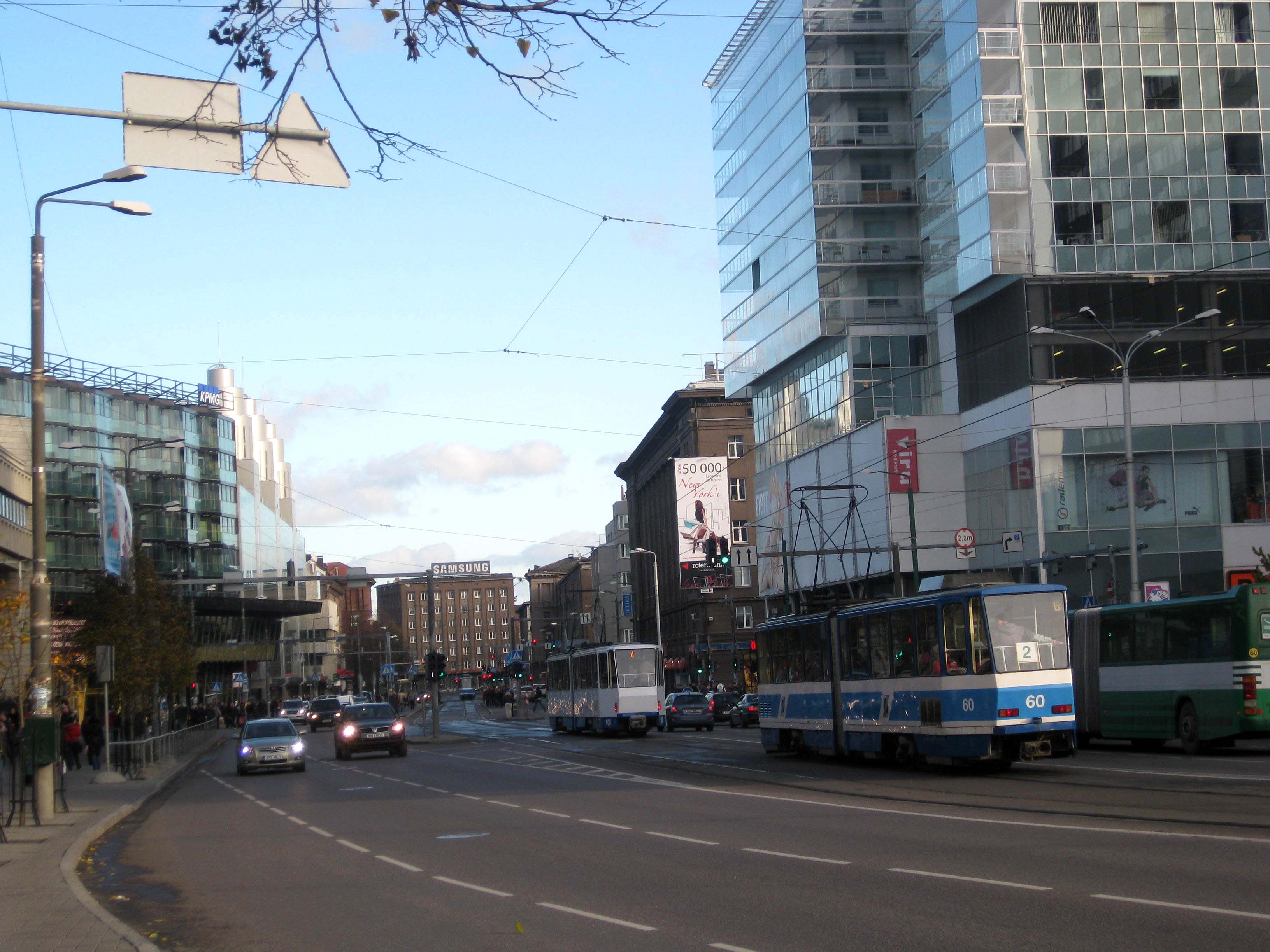 Центр Таллина